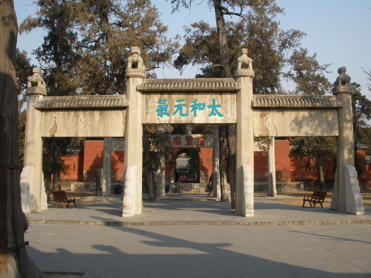 中文（中国大陆）: 山东曲阜孔庙